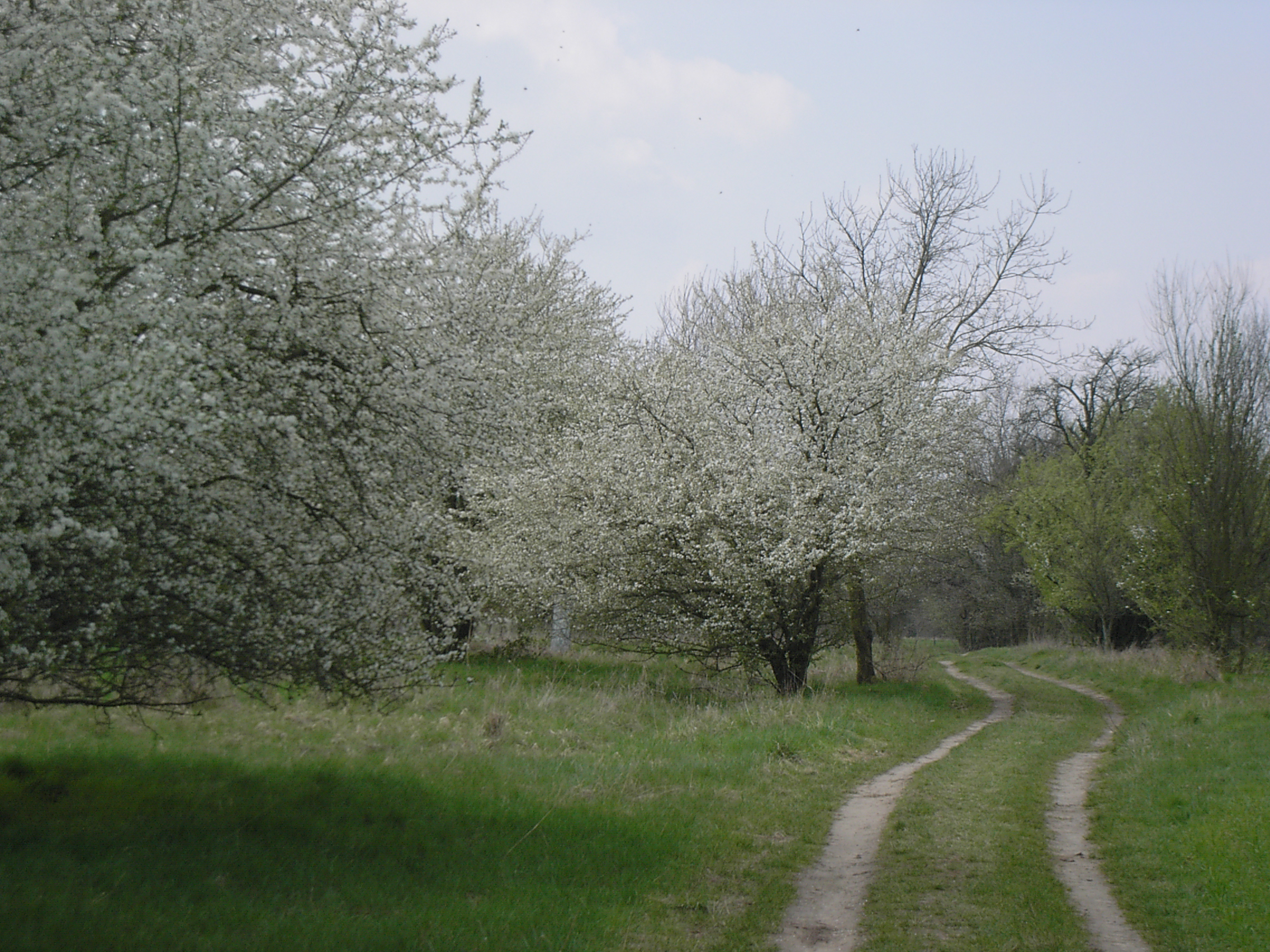 Erste Frühlingsboten, die Blüte der Weißdornsträucher